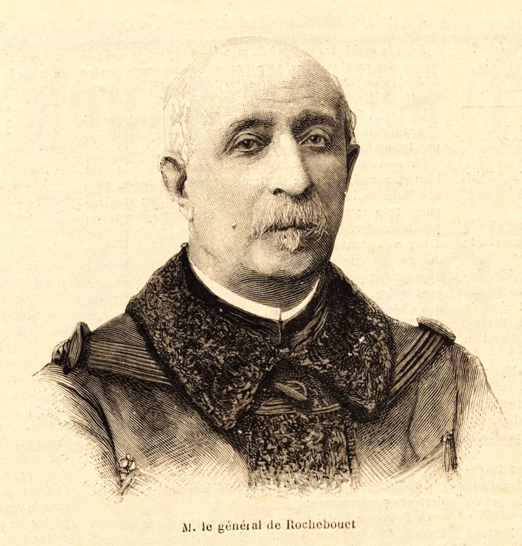 Portrait de Gaëtan de Rochebouet, président du Conseil.